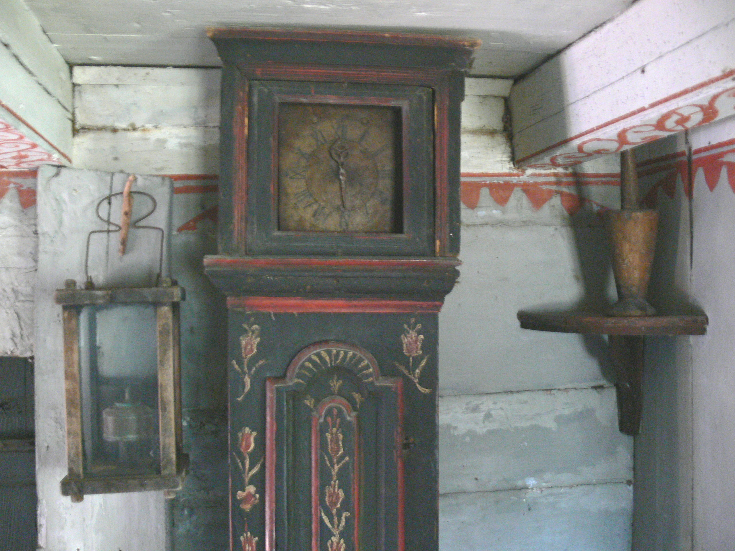 Bunge Museum auf Gotland. Hof ( 18.Jhdt. ): Wohnhaus - Standuhr in der Stube